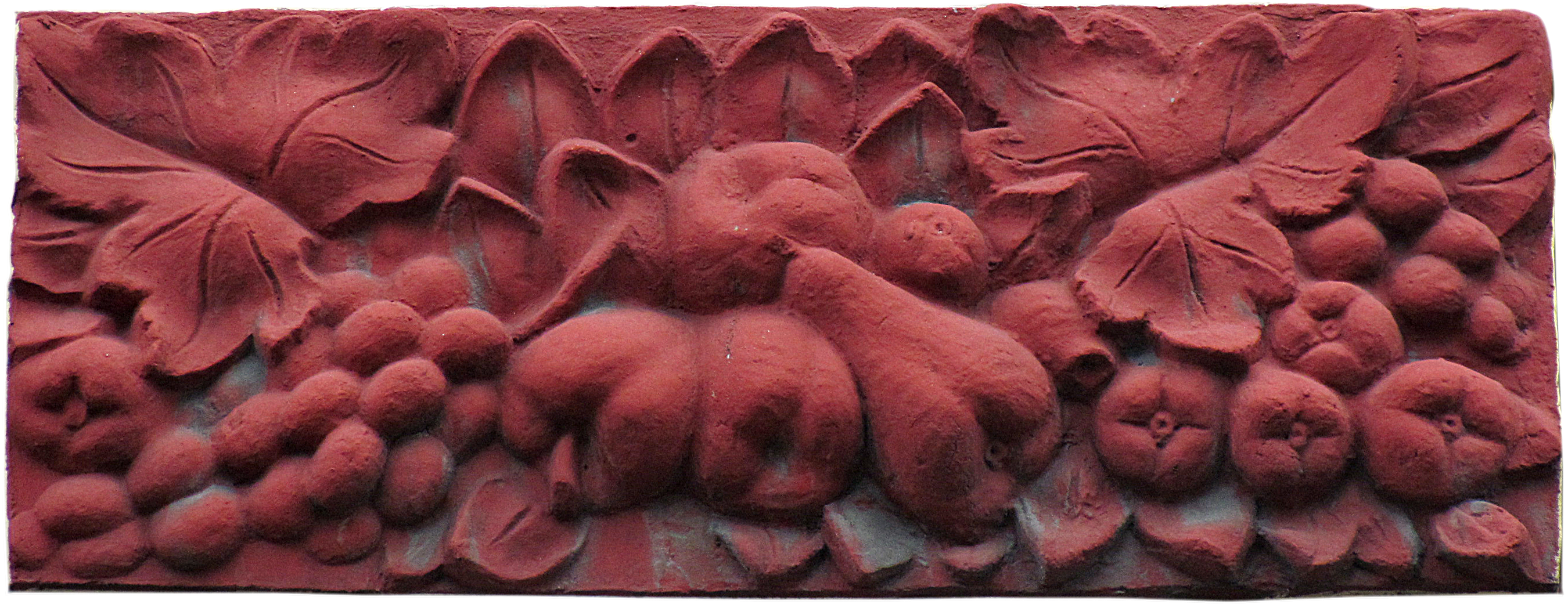 Srpski (latinica): Флорални мотиви на Вуковој задужбини